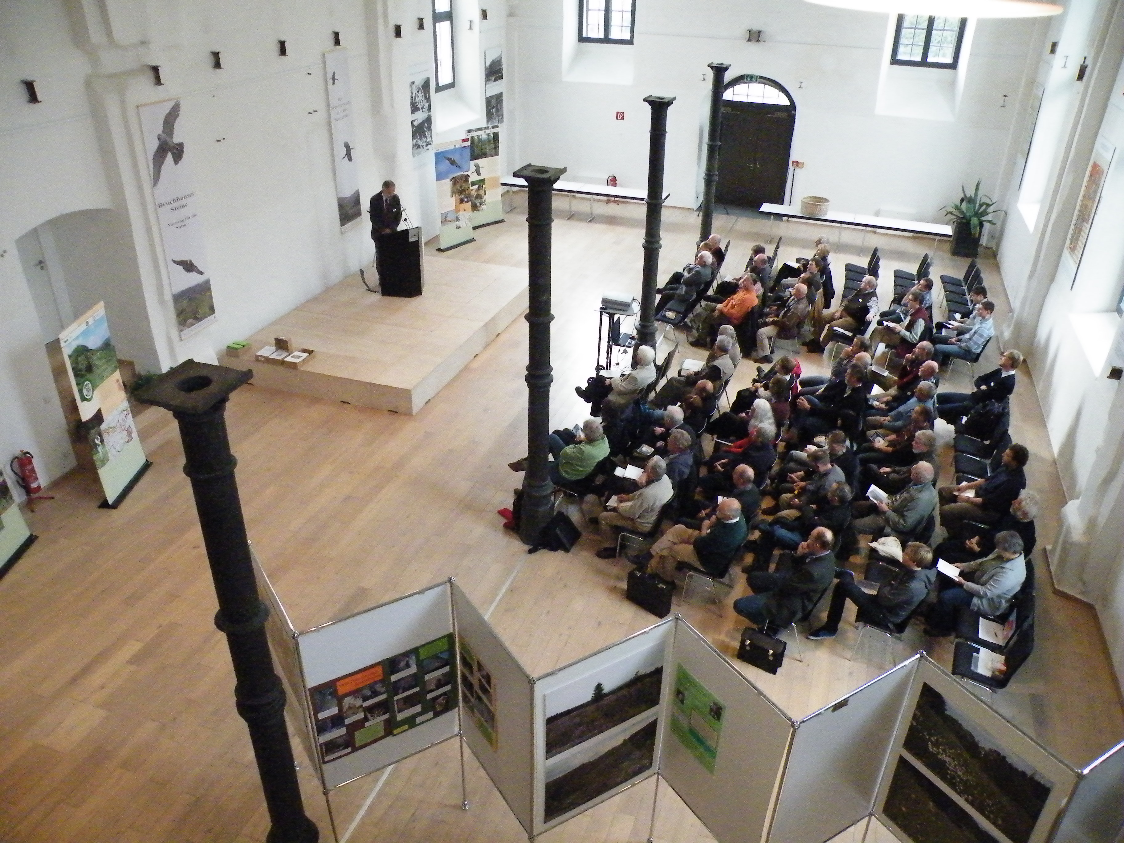 Während eines Vortrag in der ehemaligen Kapelle des Klosters Bredelar bei der Jahrestagung der AG Eulen.